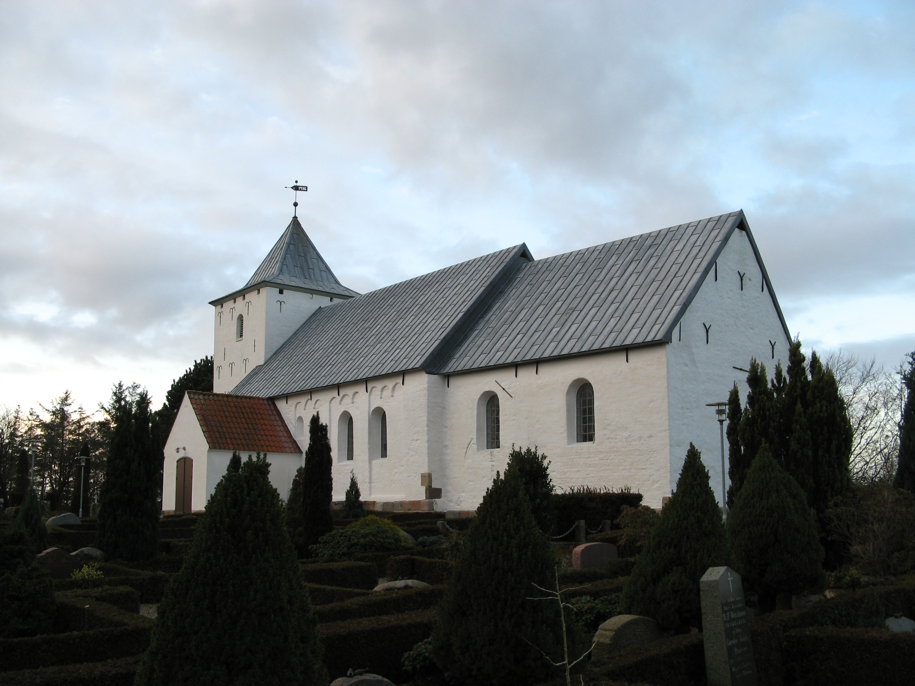 Hostrup Kirke, Hostrup sogn, Esbjerg kommune (former: Skads Herred, Ribe Amt). Kirken set fra sydvest.